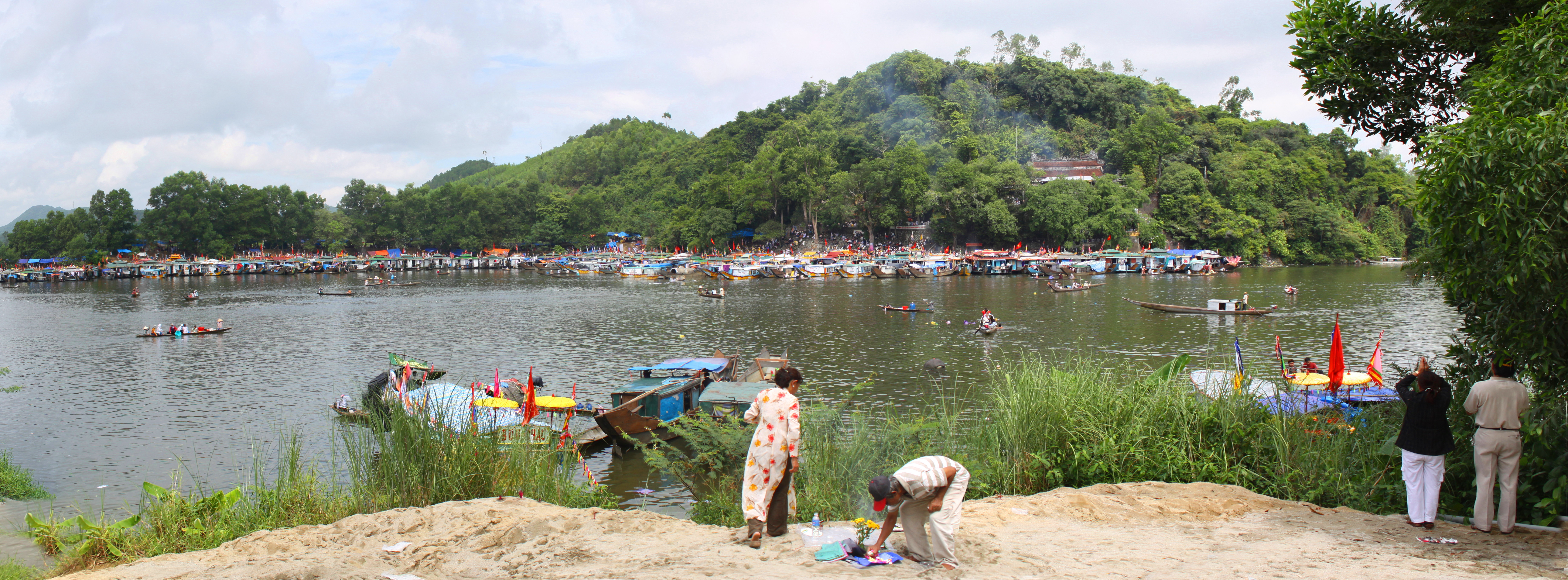 Toàn cảnh Lễ hội Điện Huệ Nam tháng 8 năm 2012